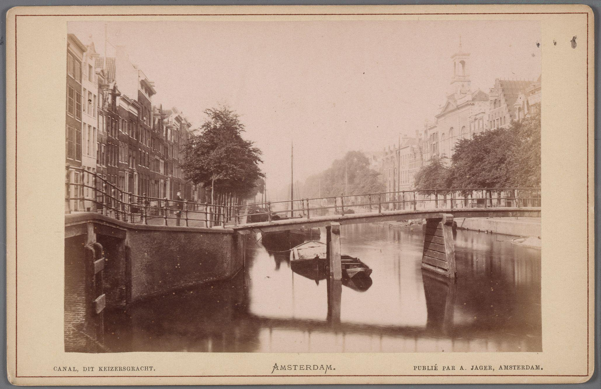 Beschrijving De Keizersgracht gezien in zuidelijke richting vanaf de BrouwersgrachtRechts rooms-katholieke kerk 'De Zaaier', Keizersgracht 22.Frontaal de Pastoorsbrug, links brug 56. Documenttype fotoVervaardiger Jager, A.Collectie Collectie Stadsarchief Amsterdam: kabinetfoto'sDatering 1867 t/m 1883Geografische naam KeizersgrachtKeizersgrachtInventarissen 010005000305 Generated with Dememorixer